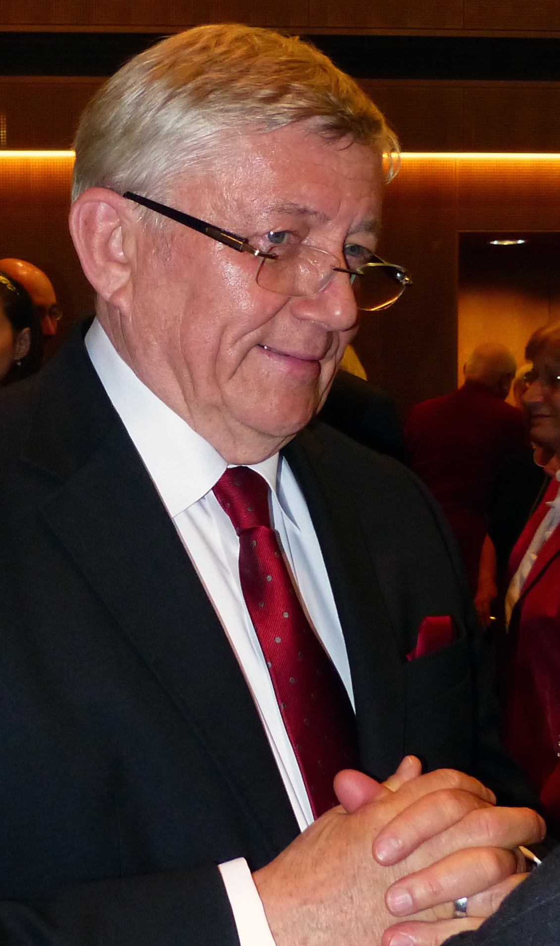 Wolfgang Berghofer in Dresden, 26. Mai 2015